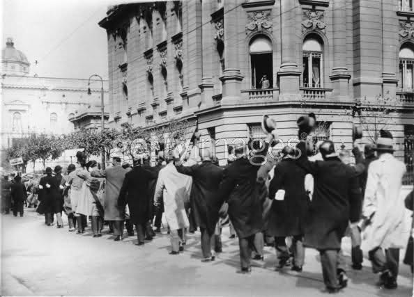 Kralj Aleksandar Karađorđević - 1925. pozdravlja ratne veterane